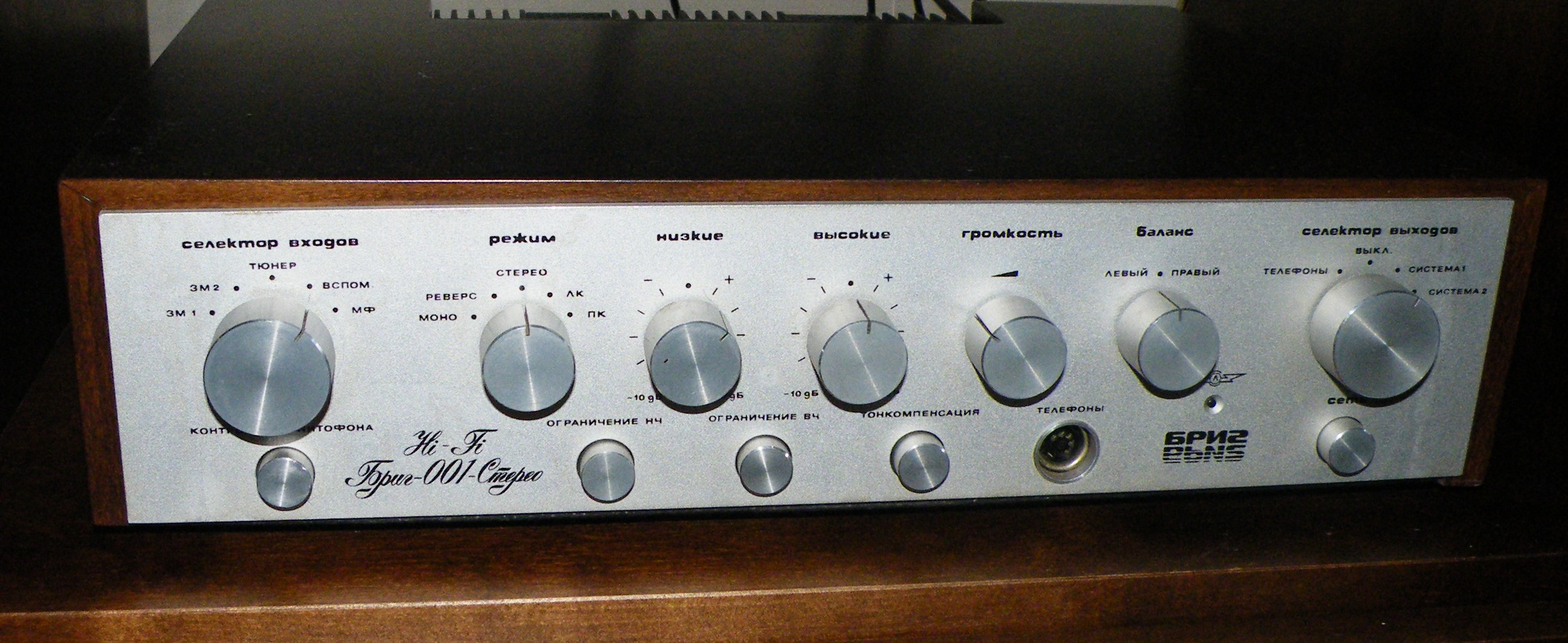 Бриг 001 первая ревизия г. Омск, коллекция ауд-л Хорошавин А.А.